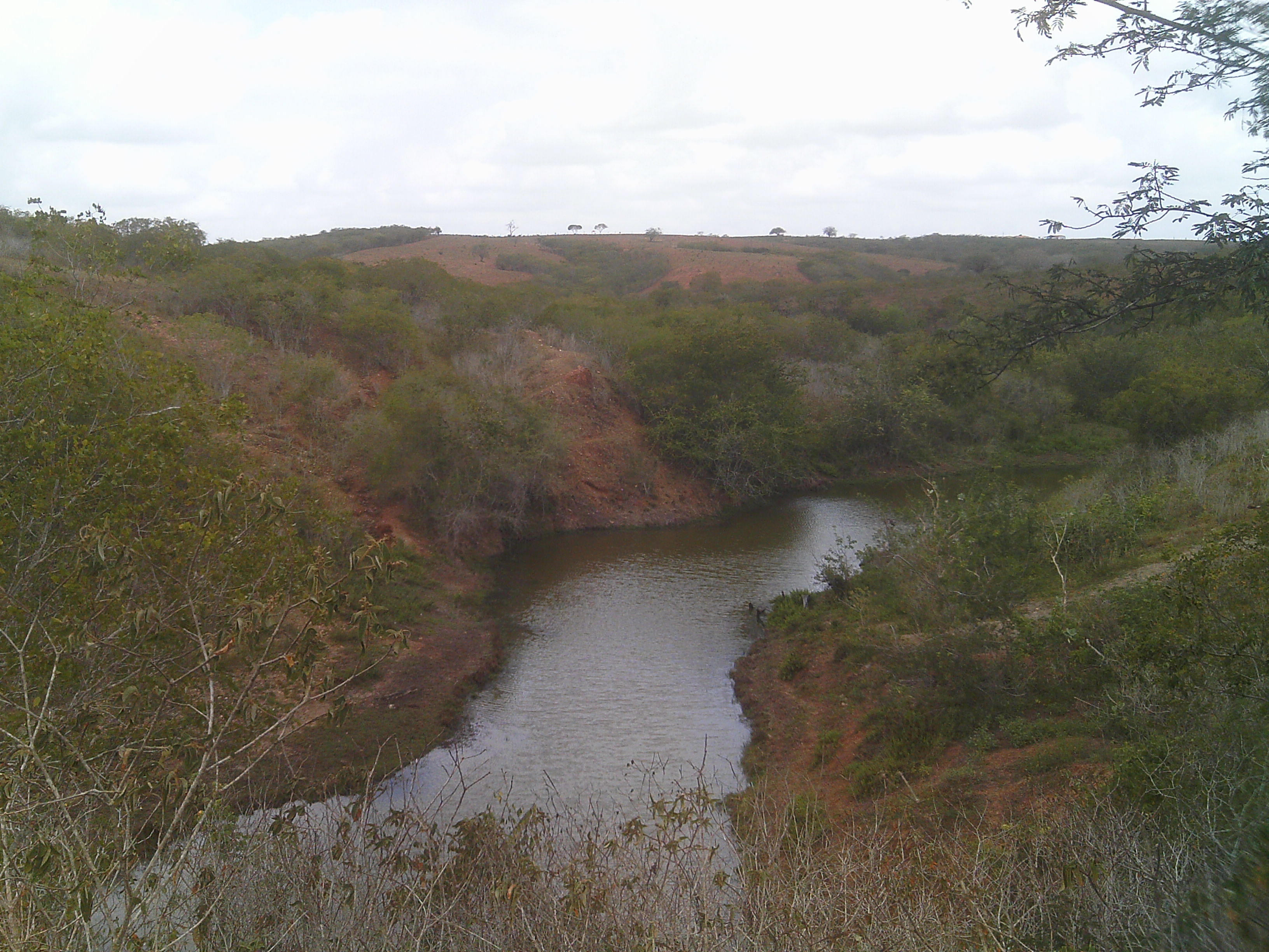 Fotografia do Riacho Capivara, afluente do Rio São Francisco entre Monte Alegre e Glória.